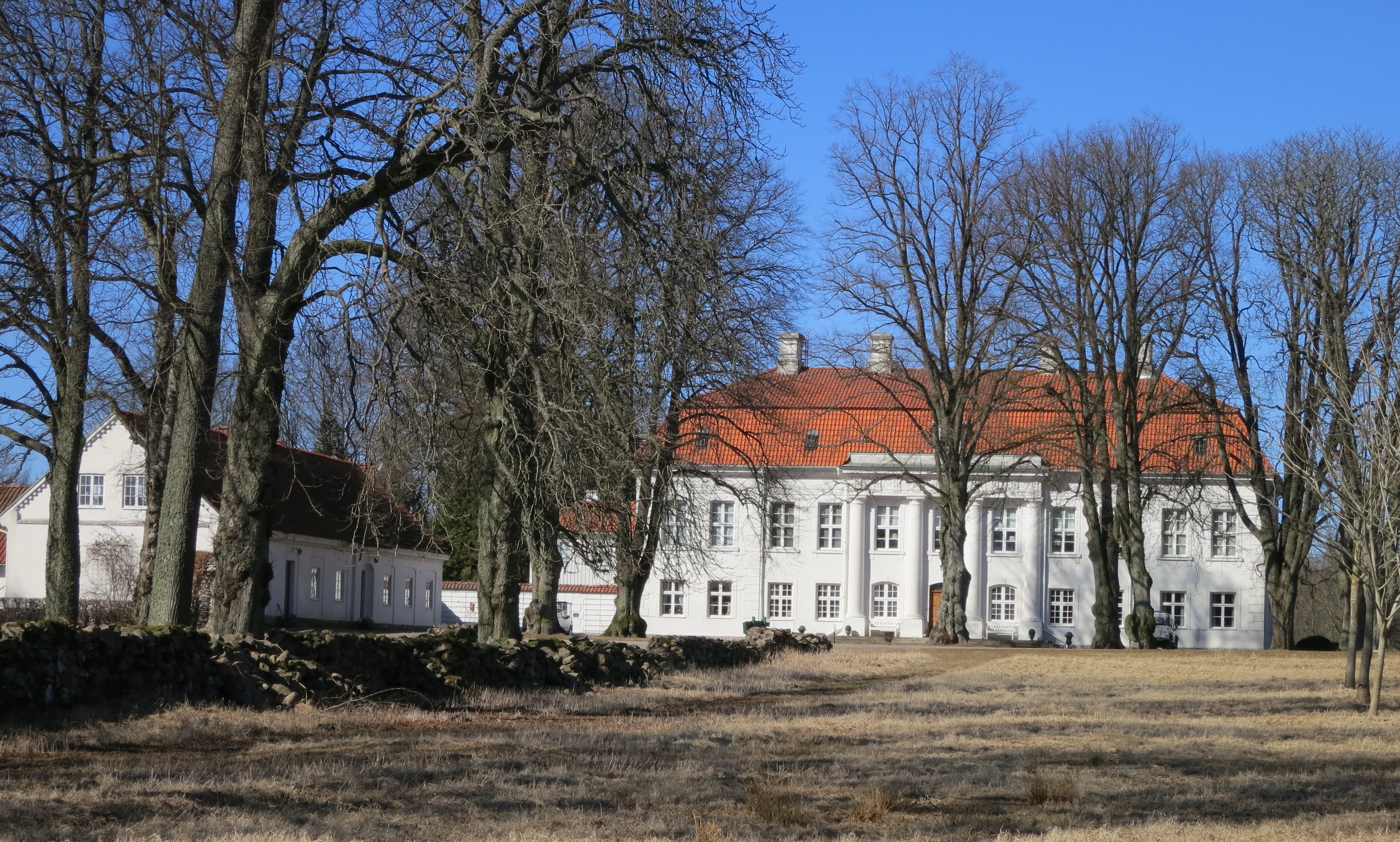 Skillinge säteri i Skåne